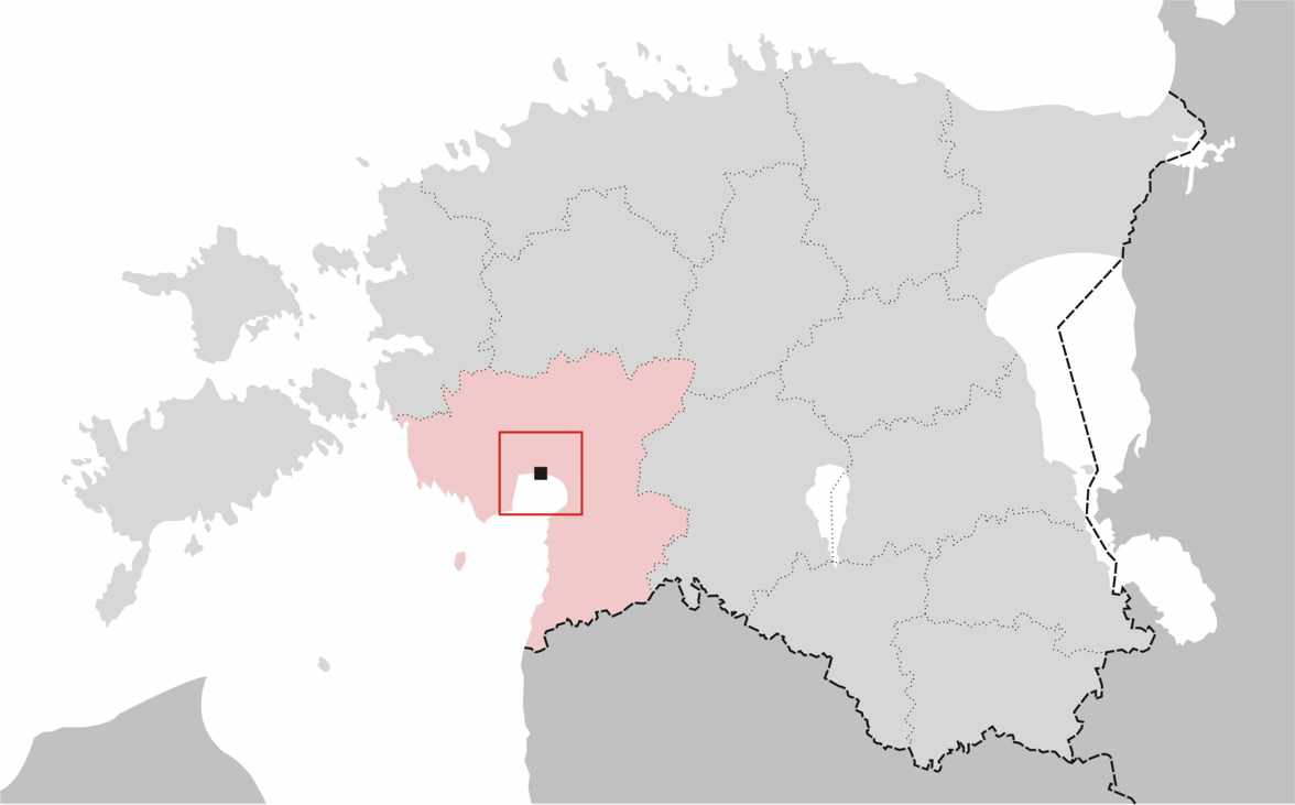 Lage der estnischen Stadt Pärnu